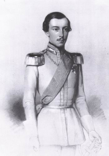 Prinz Georg von Preußen (1826-1902)